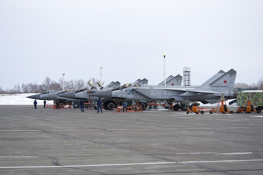 Выполнение групповых полетов экипажами истребителей Миг-31 в рамках плана боевой подготовки (аэр.Елизово, п-ов Камчатка)